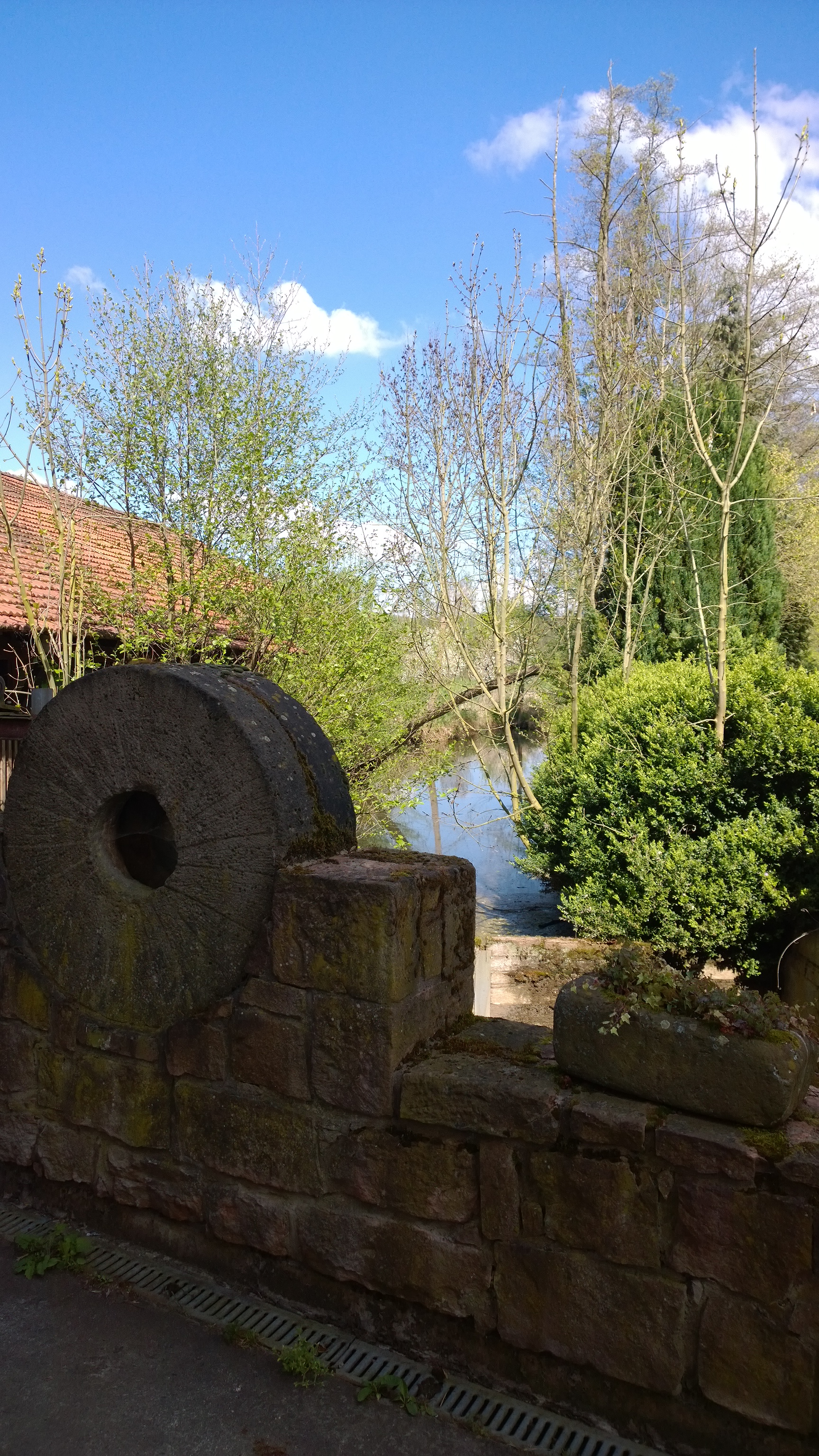 Mühlstein an der Brücke zur Nidderinsel